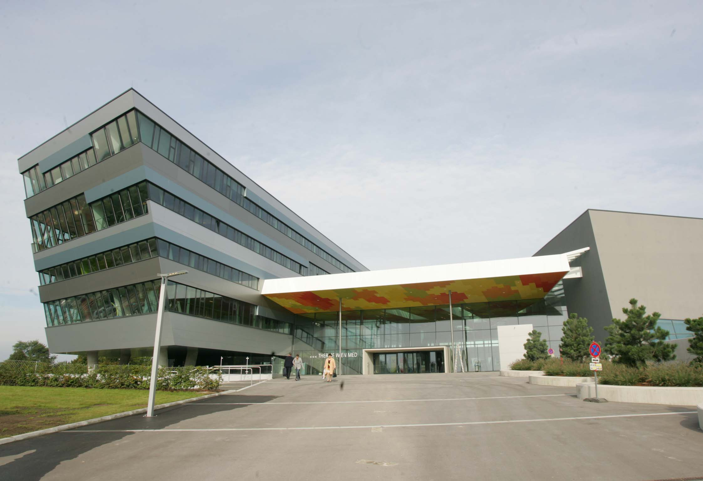 Aussenansicht der Wellness- und Thermenlandschaft Therme Wien Med in Oberlaa